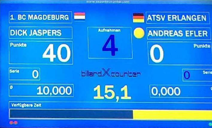 Anzeigetafel von Dick Jaspers' Weltrekord im Einzeldurchschnitt von 10,000 am 21. Januar 2018. Die Partie spielte er für den 1. BC Magdeburg gegen Andreas Efler.